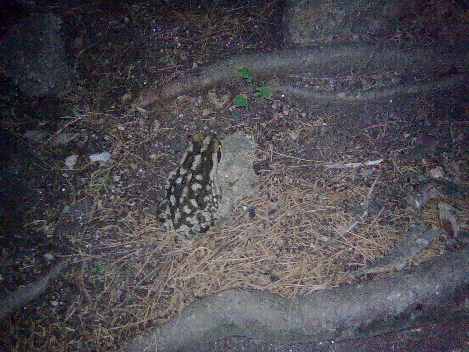 Rana de las piedras Nono